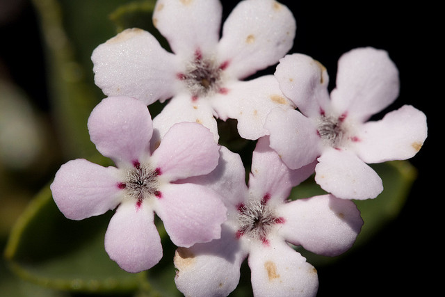 Teedia lucida flowers close-up